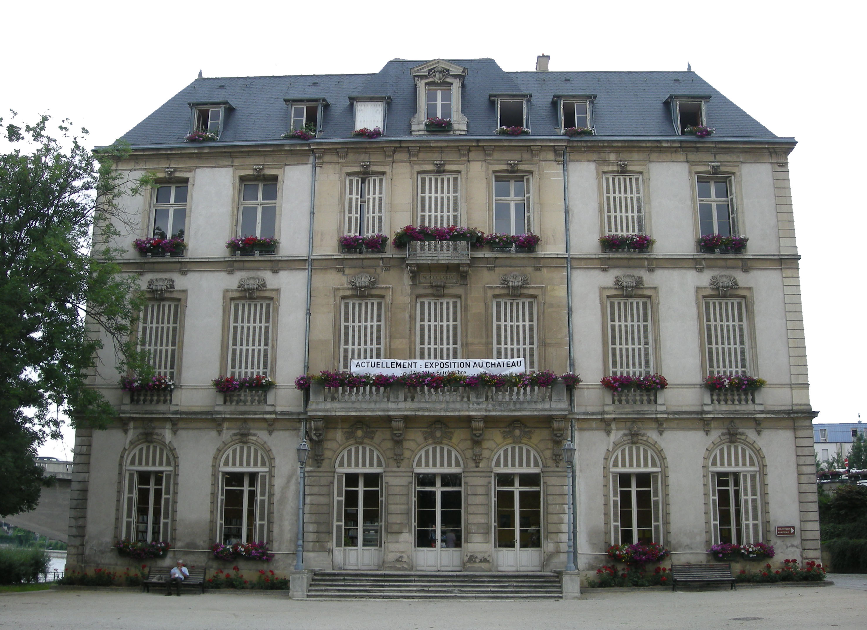 Château du Pont de la Meurthe à Saint-Max (Meurthe-et-Moselle)